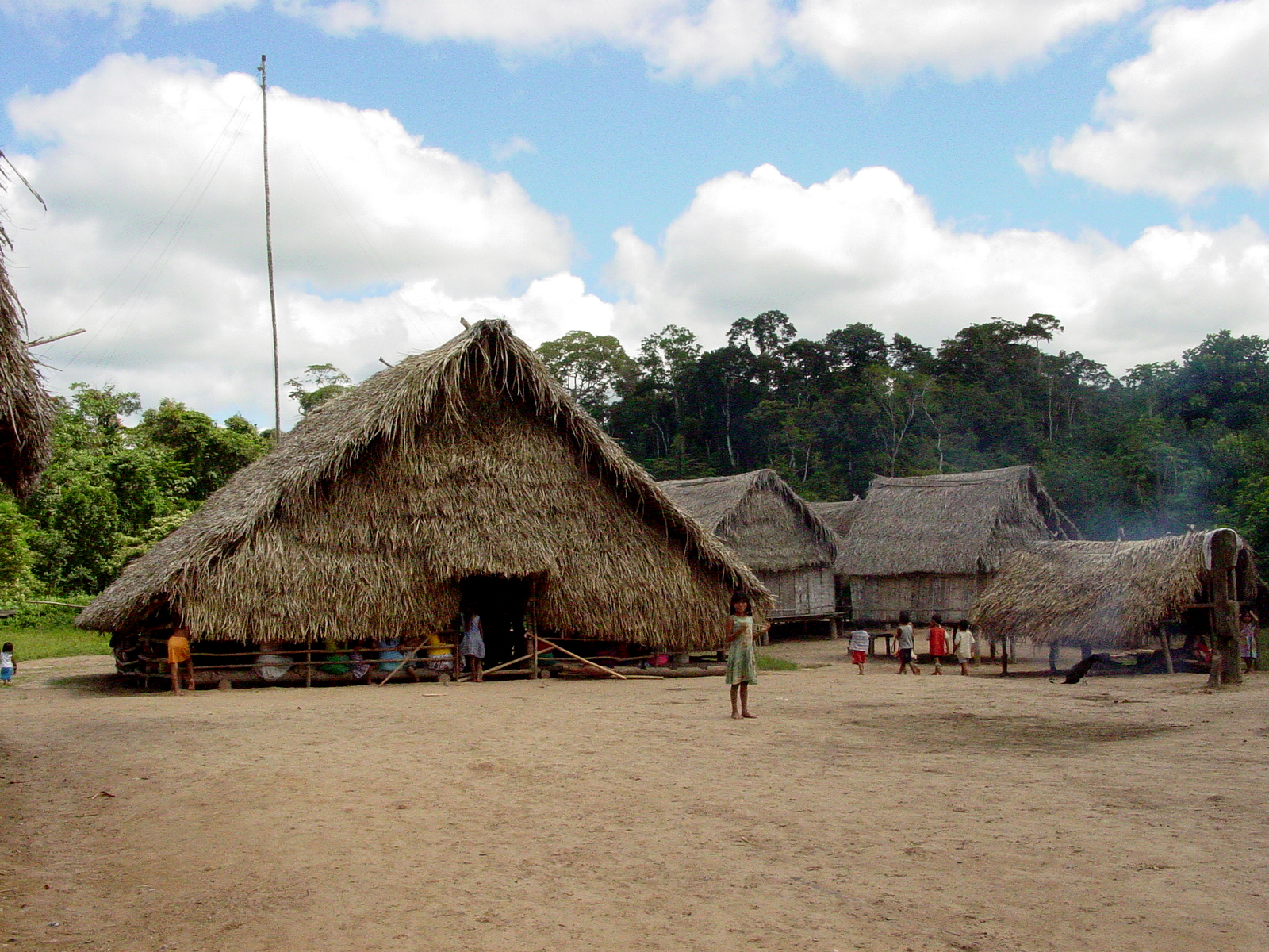 Aldeia Caxinauás no Acre